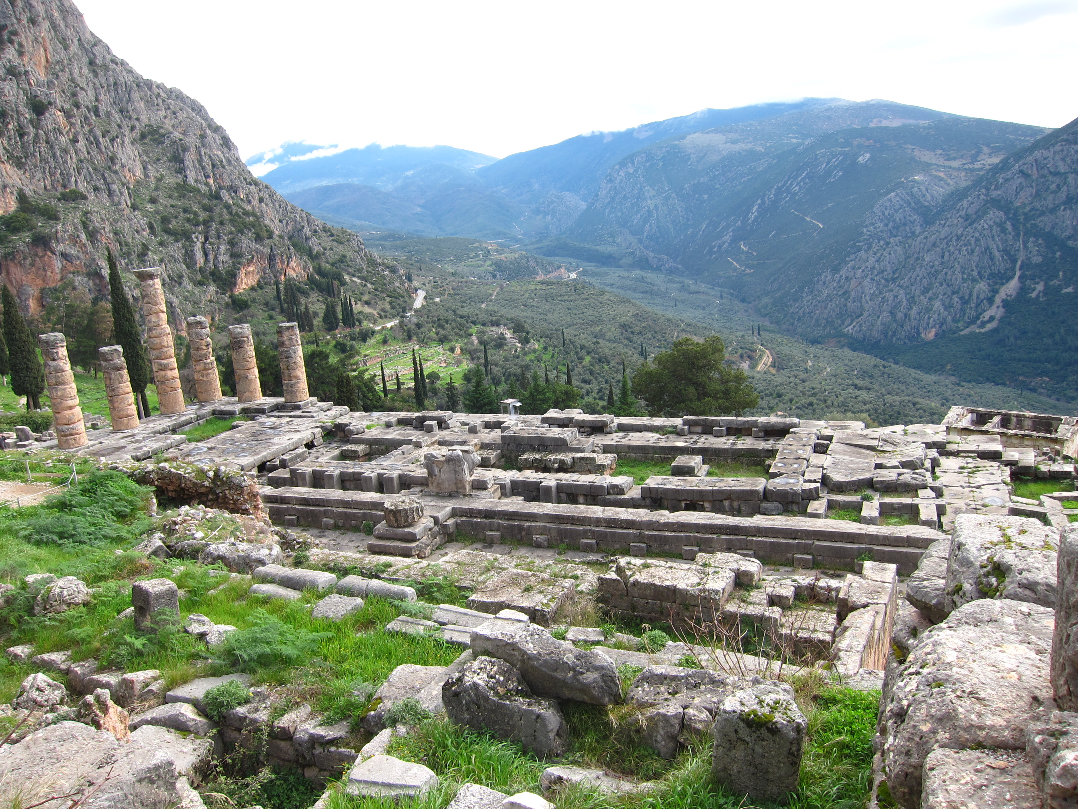 Δελφοί«Δελφοί»